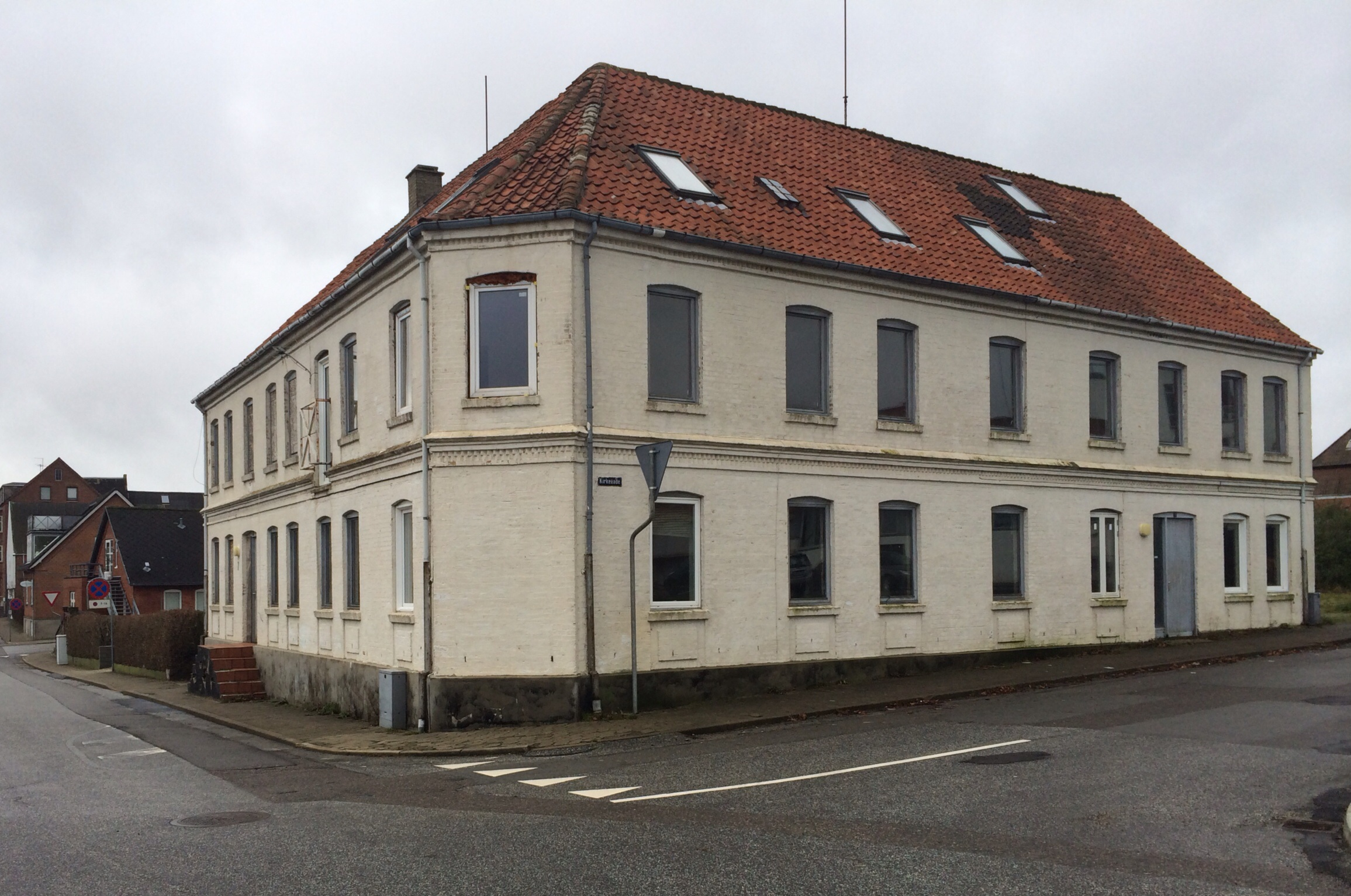 Forfatteren Hans Kirk er født i Hjortsminde på Jacob Møllers Gade i Hadsund, Nordjylland.